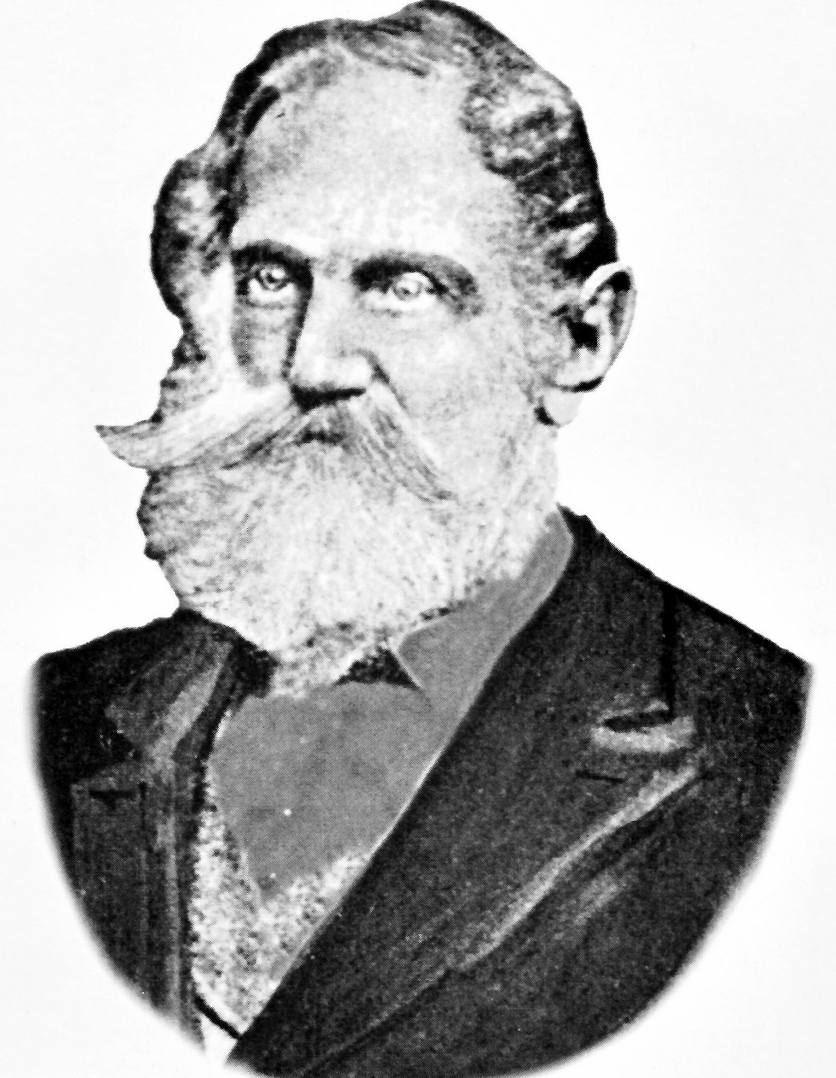 Pavol Weszter (1843- 1921) investoval nemalé prostriedky do rozvoja tatranských osád